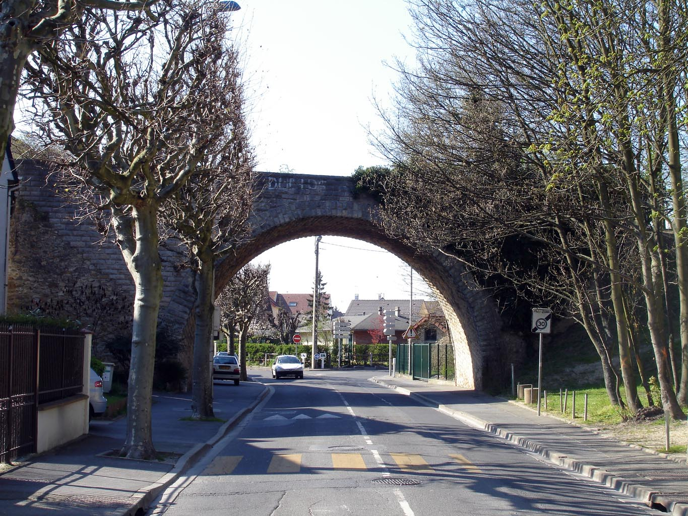 Pont de la ligne Aulnay - Rivecourt, rue Henri-Barbusse à Villepinte (Seine-Saint-Denis), France Les travaux de la ligne de chemin de fer furent interrompus par la Première Guerre mondiale et ne furent jamais achevés, les ouvrages d'art seuls ayant été partiellement réalisés.